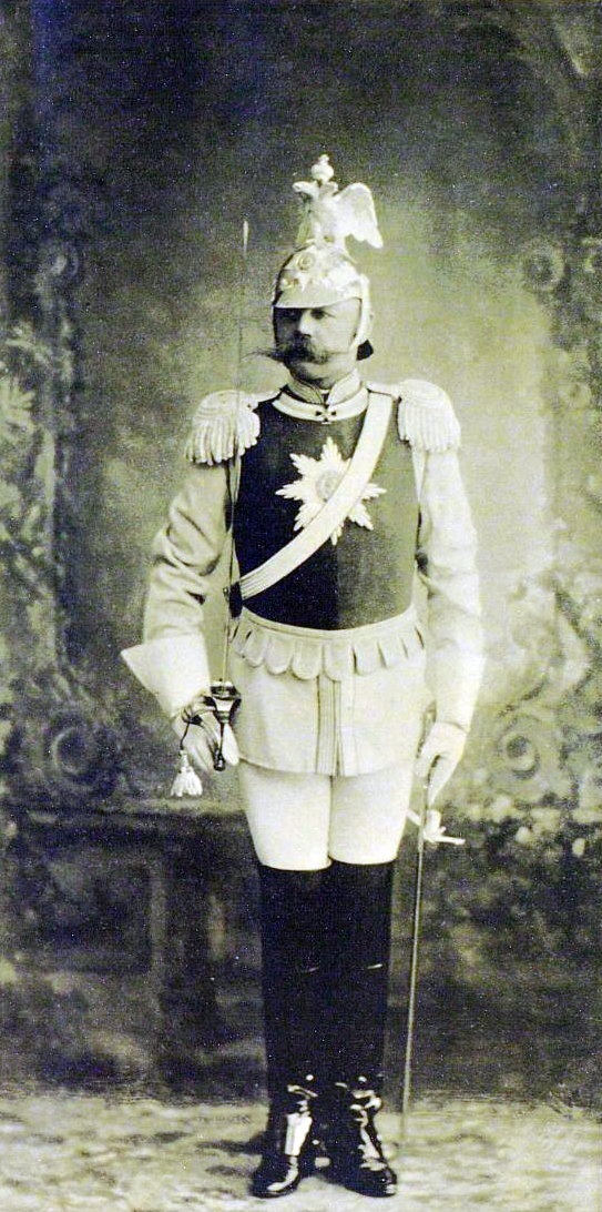 Артур Александрович фон Гринвальд (1847–1922гг). Генерал адъютант. Кавалергардский полк.